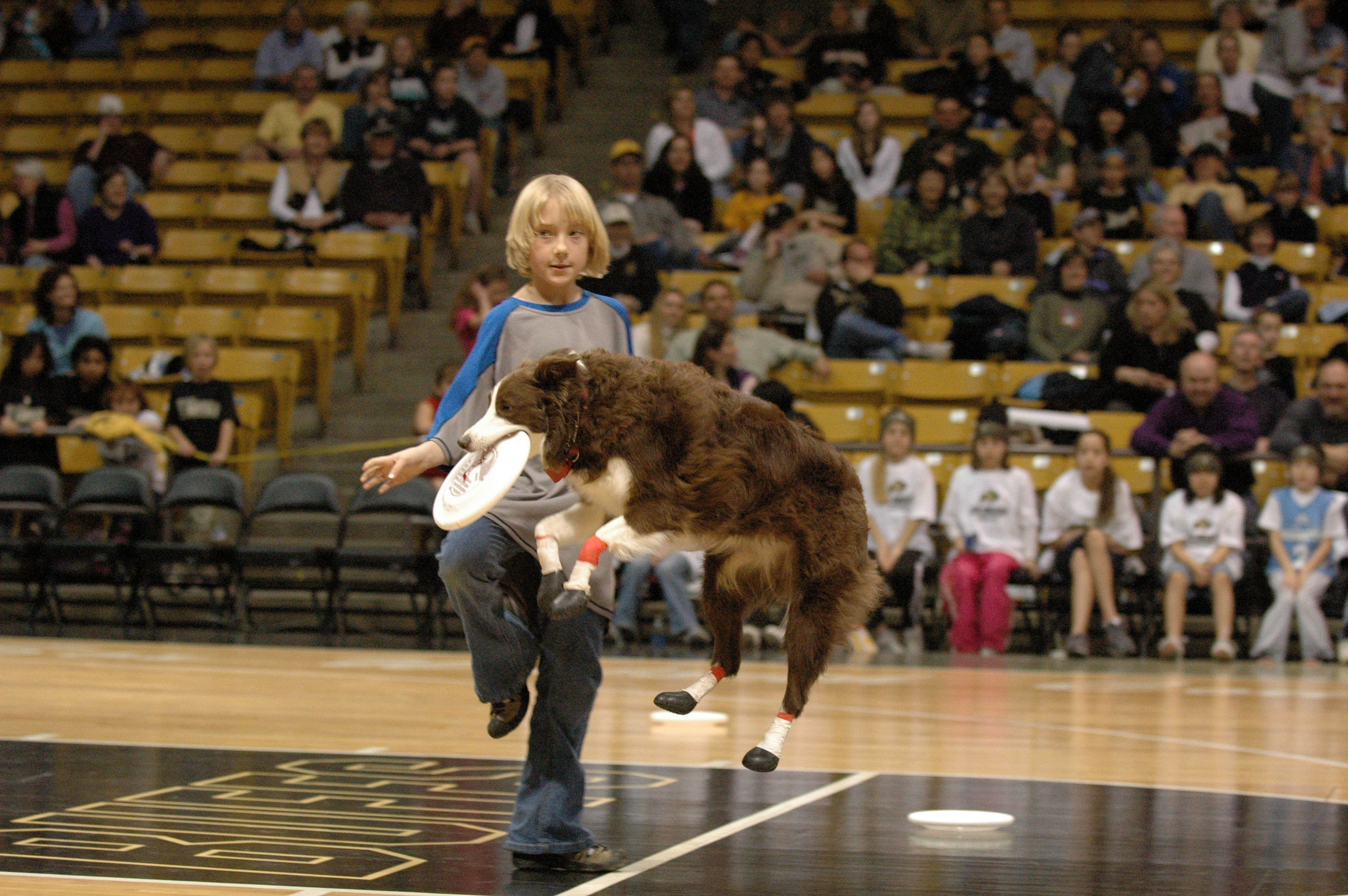 Disk dogging